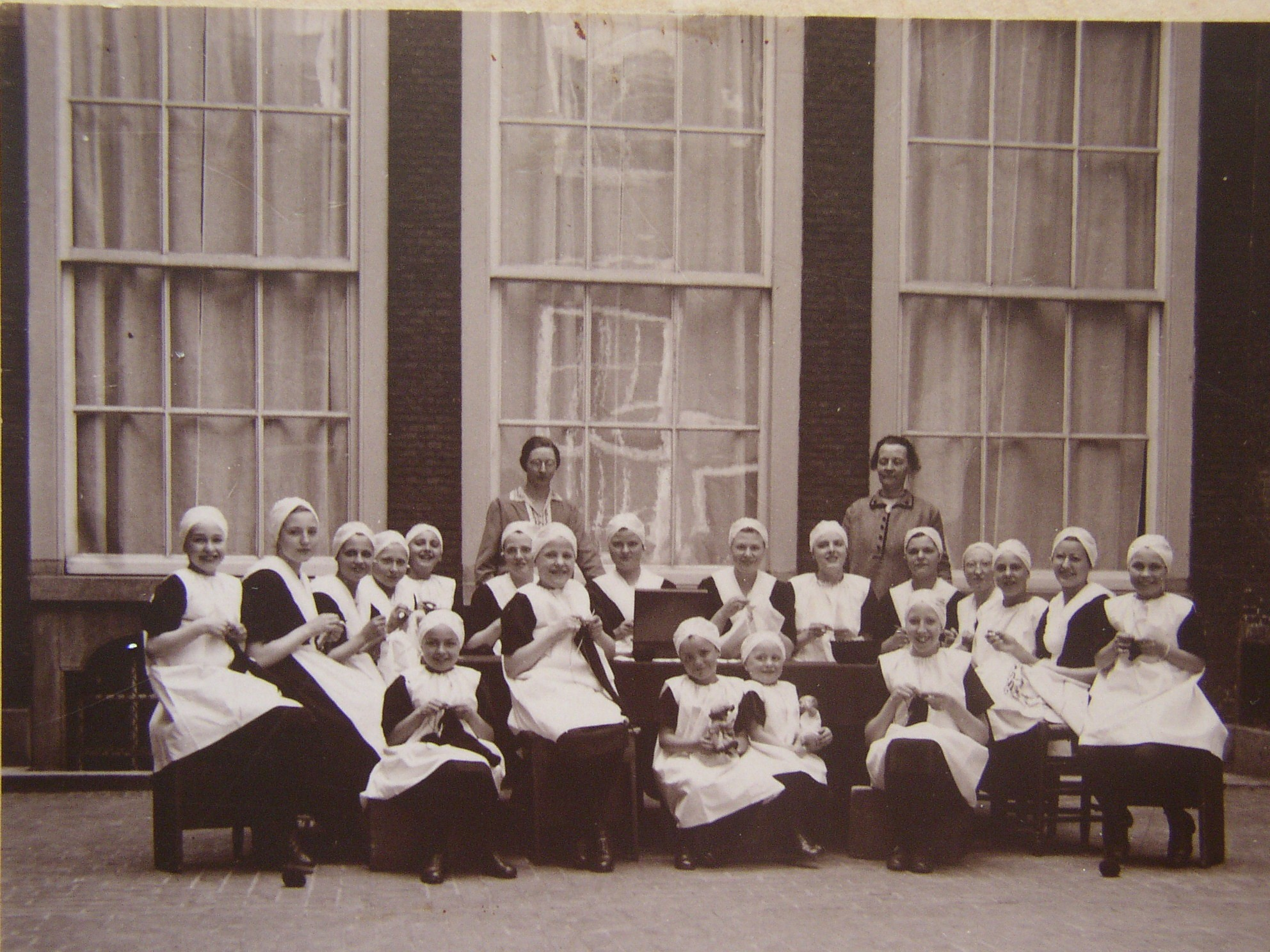 Groepsfoto van de pupillen van het Meisjeshuis